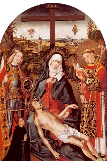 Esta obra, que está colocada en la Sacristía de los Cálices de la catedral de Sevilla, (España), fue pintada por Juan Núñez a finales del siglo XV, y es la única obra conocida conservada de este autor.